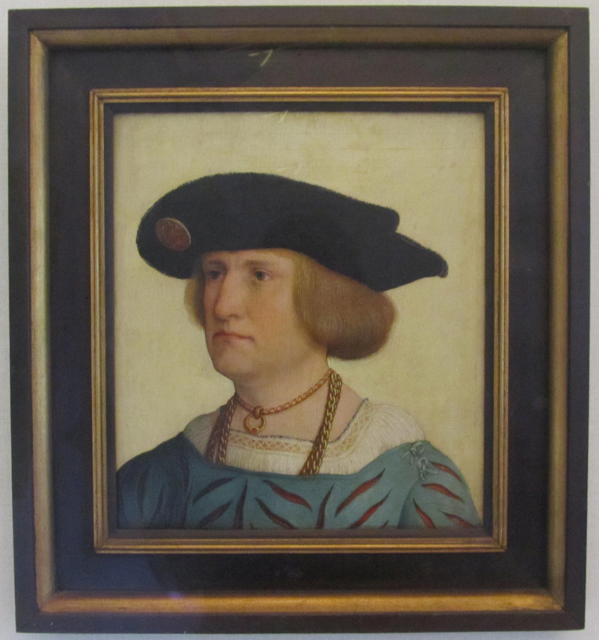 Siegmund von Dietrichstein, Hans Maler von Schwaz, um 1515, ausgestellt im Schlossmuseum in Weimar.